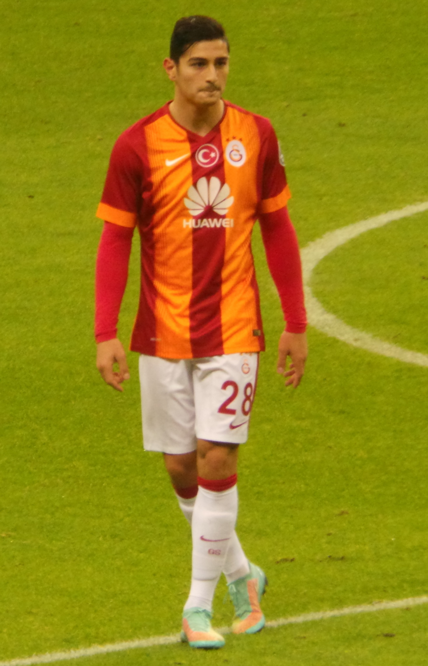 Koray Günter 2014 yılında Trabzonspor maçında